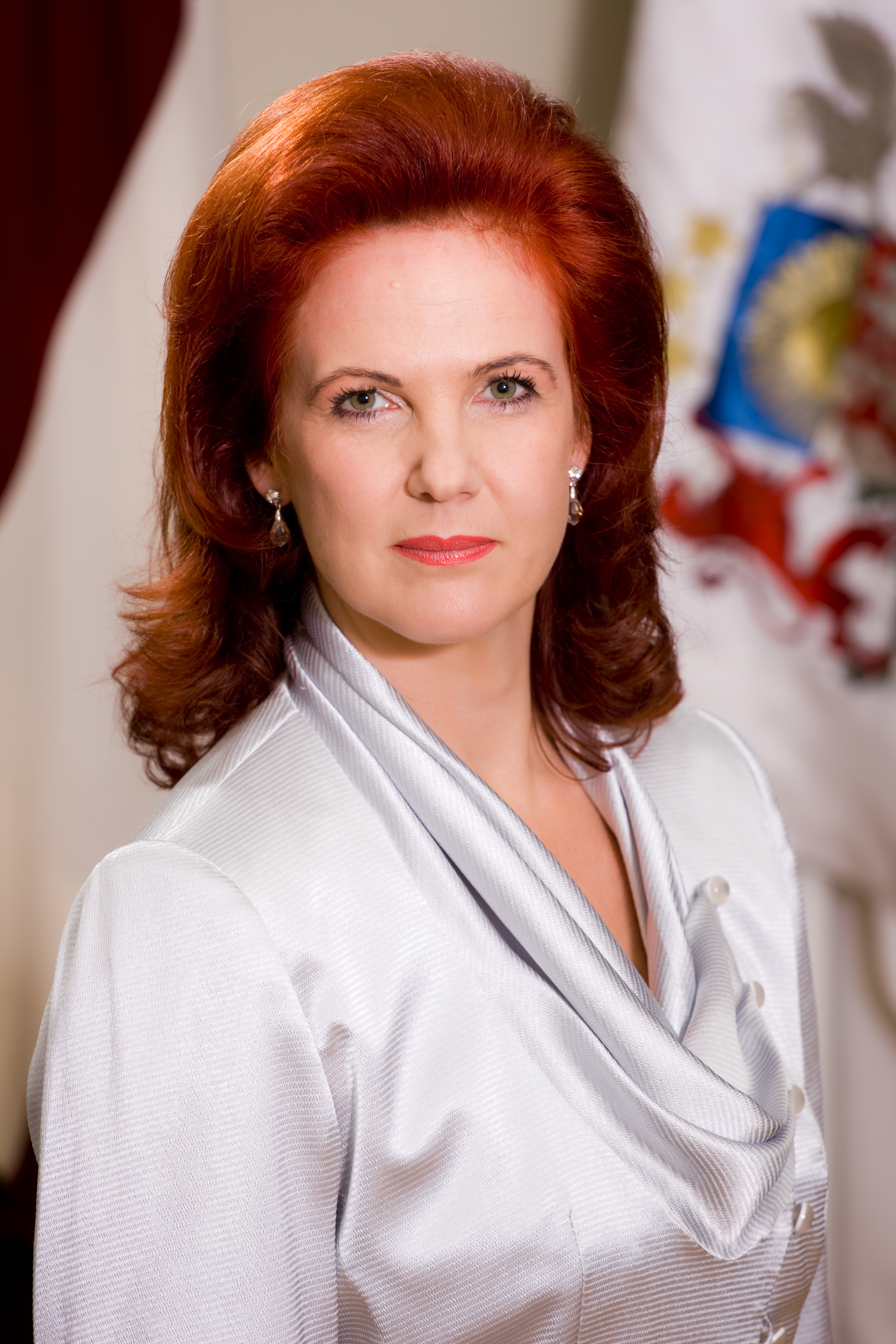 Foto: J.Deinats